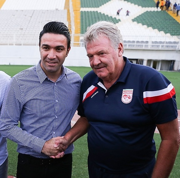 مربیان نساجی-تراکتور بعد بازی